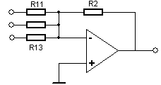 Summierverstärker mit einem OP